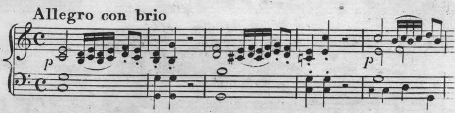 London: Monzani & Hill, n.d.[1807-13].